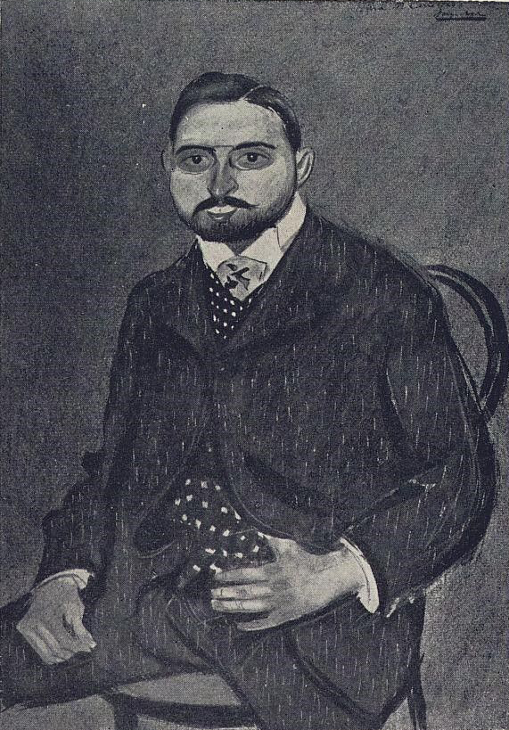 M. Carretero.